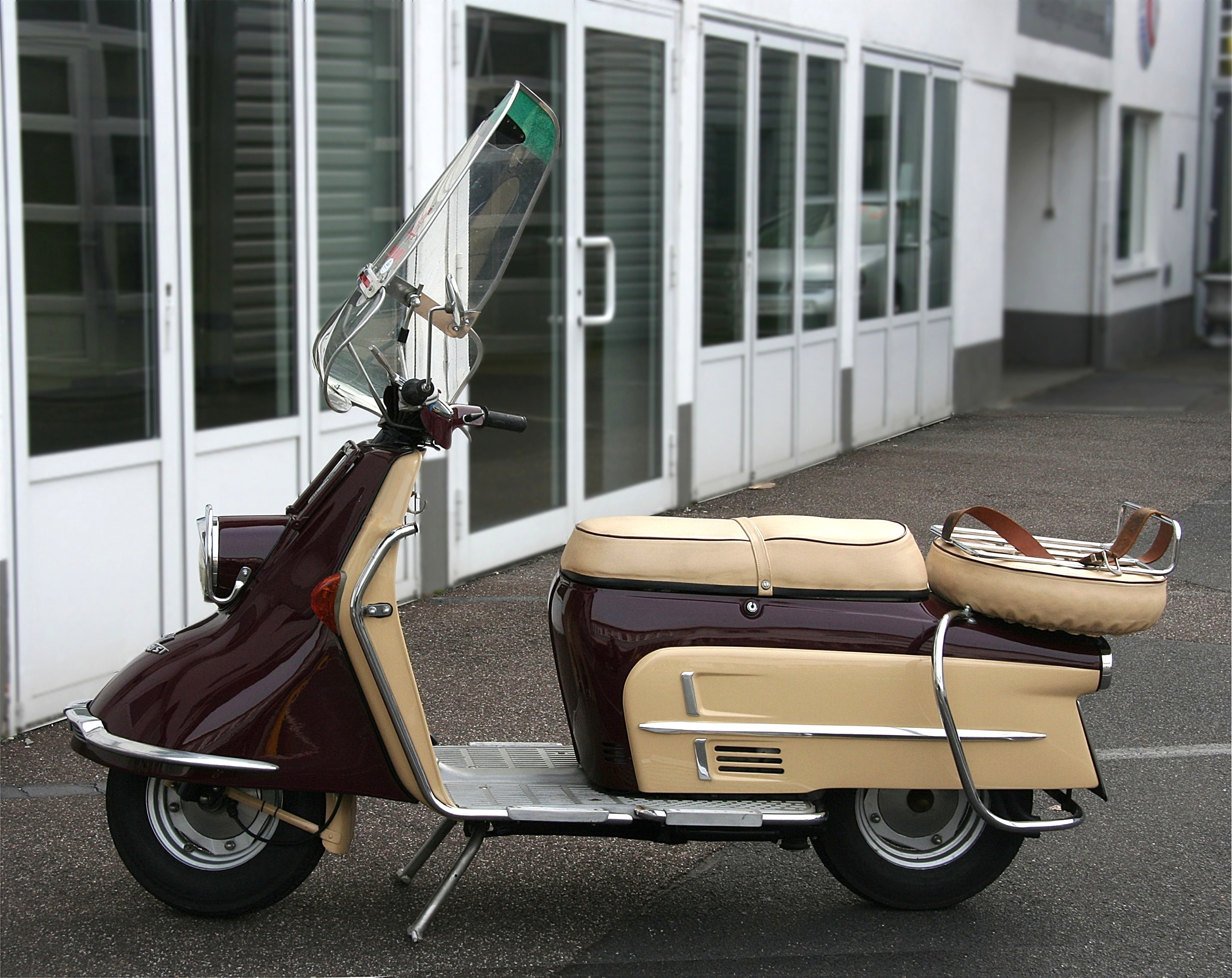 Heinkel Tourist 103 A2, Baujahr 1962